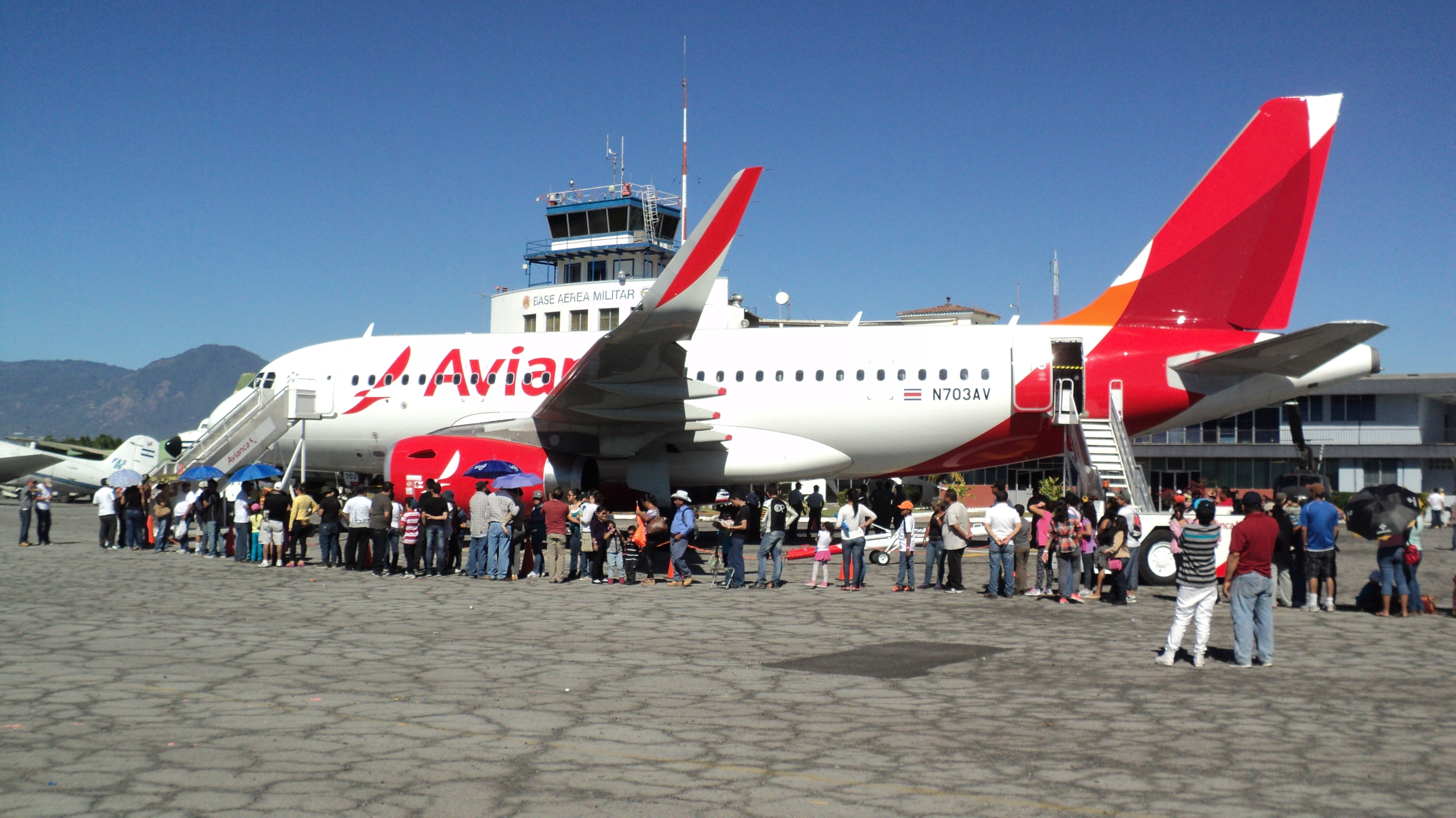 Airbus A319 durante IAS 2014